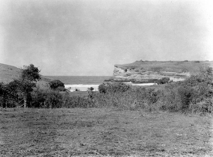 Negatief. Kustgezicht met rotsen bij Tandjoeng Ringgit